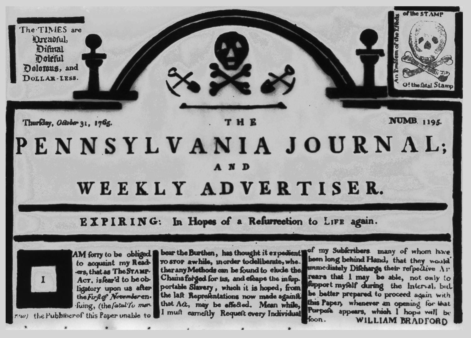 La une du magazine The Pennsylvania journal and weekly advertiser avec le timbre officiel rendu obligatoire par le Stamp Act de 1765.